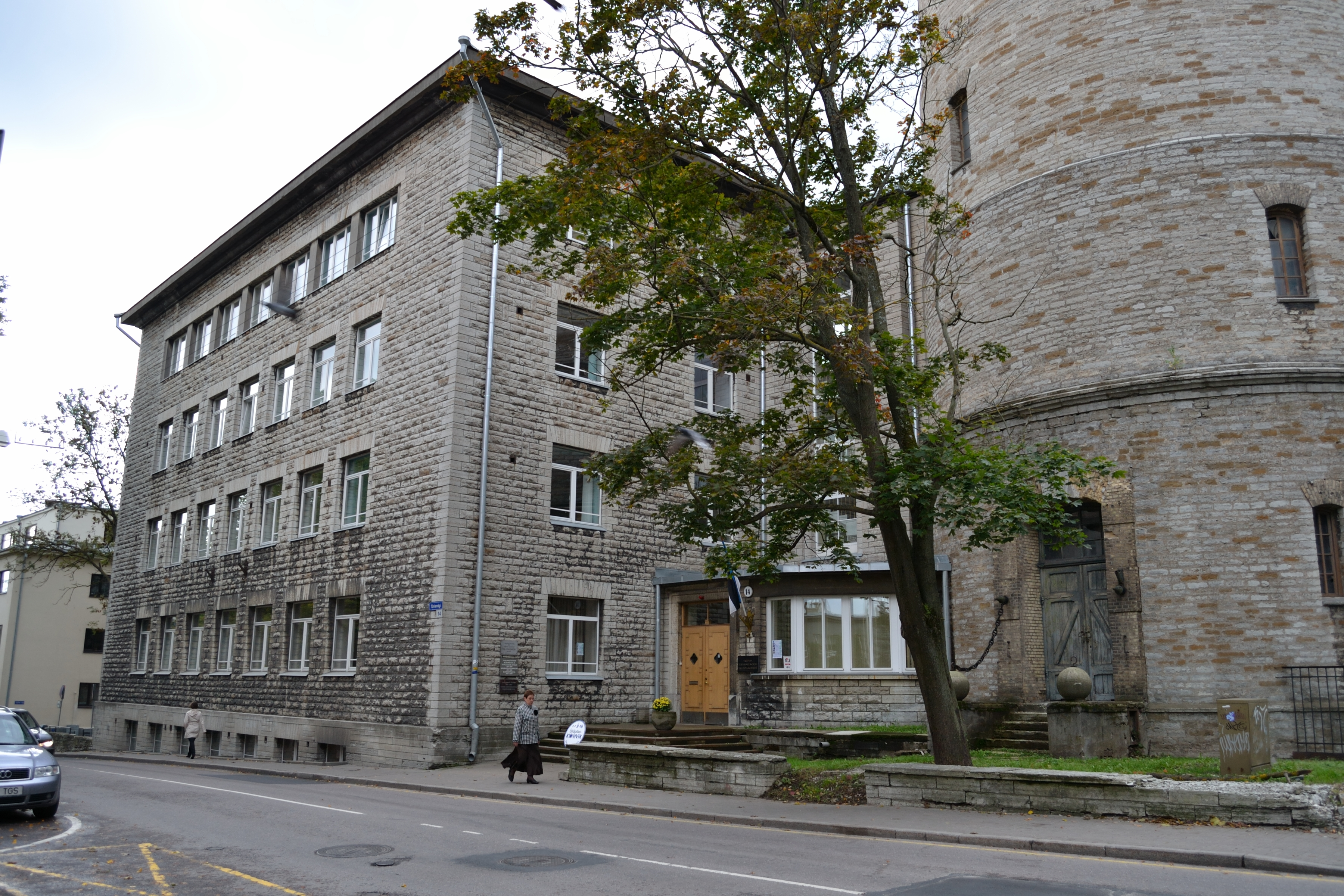 Tallinn, koolihoone veetorniga Tõnismägi 12, 14